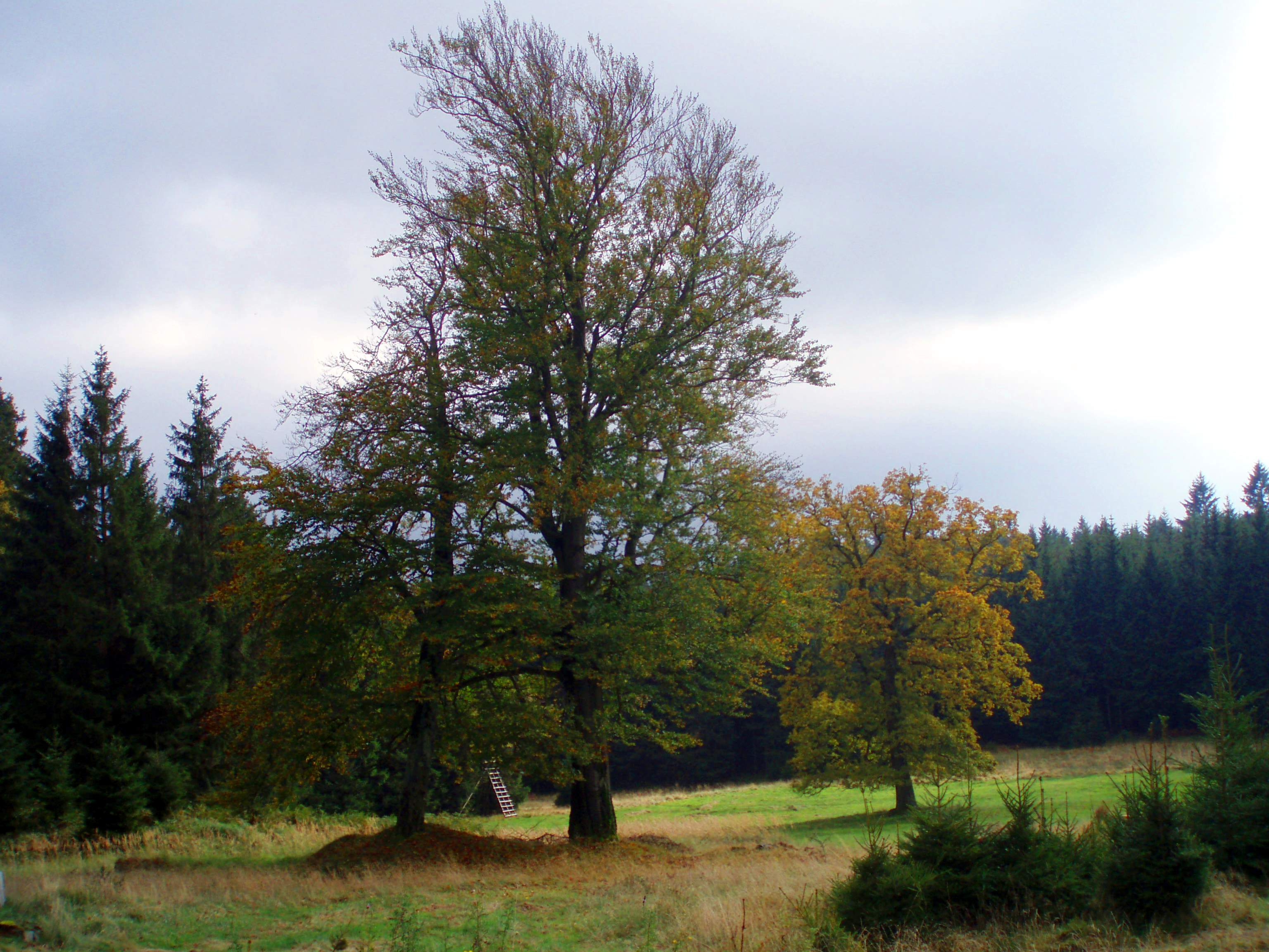 Standort der Ernstburg bei Ilsenburg